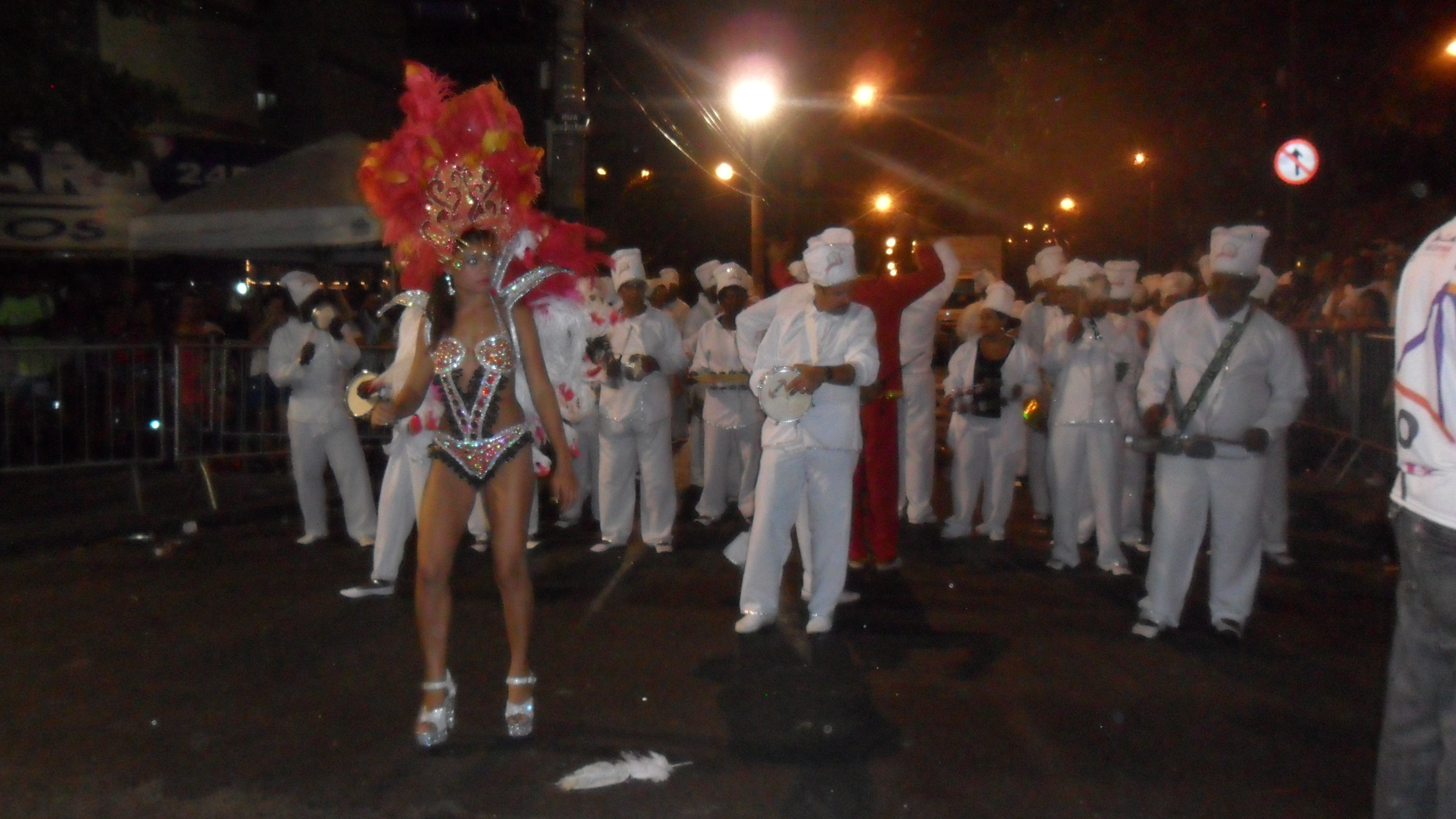 GRES Colibri de Mesquita